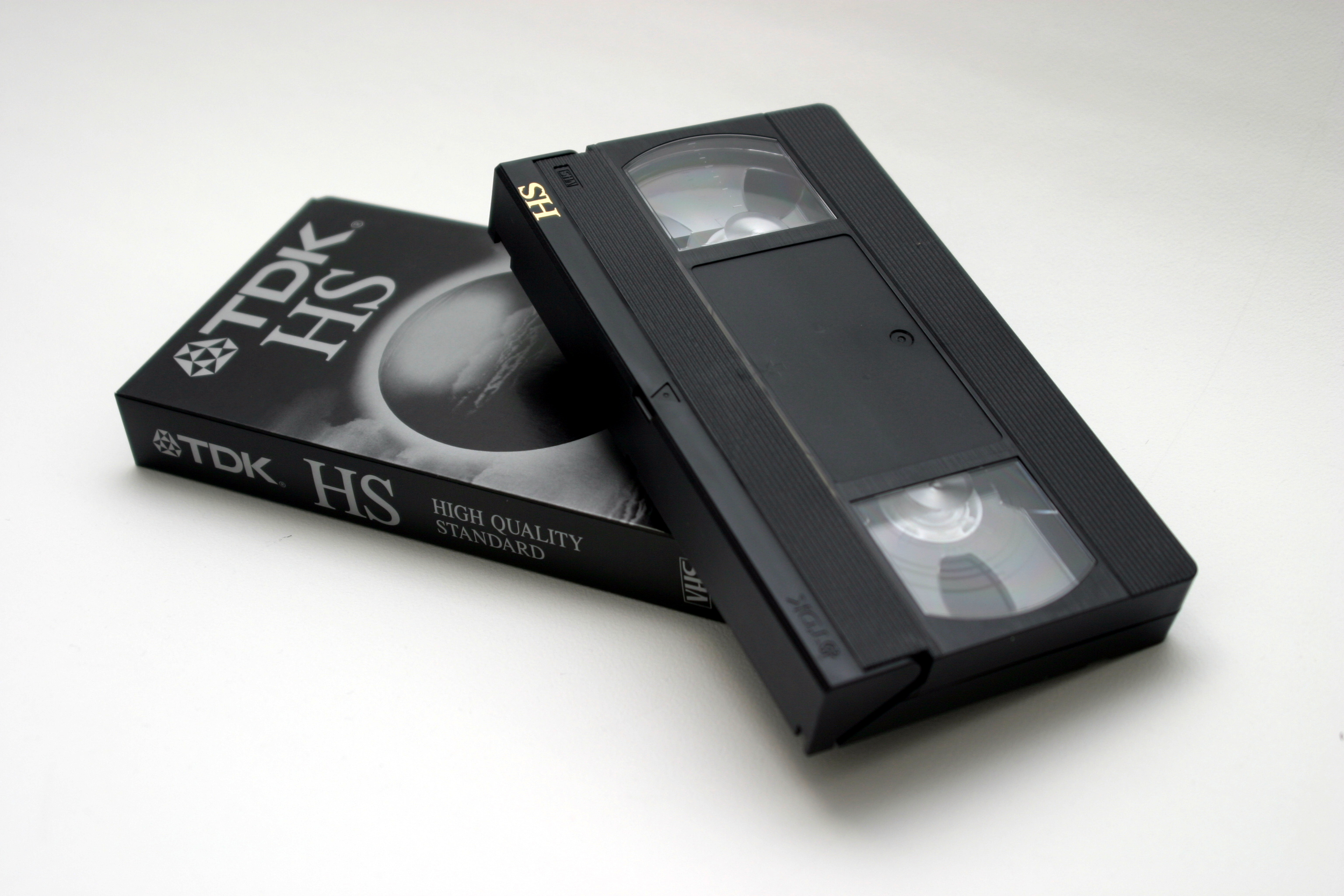 VHS casette